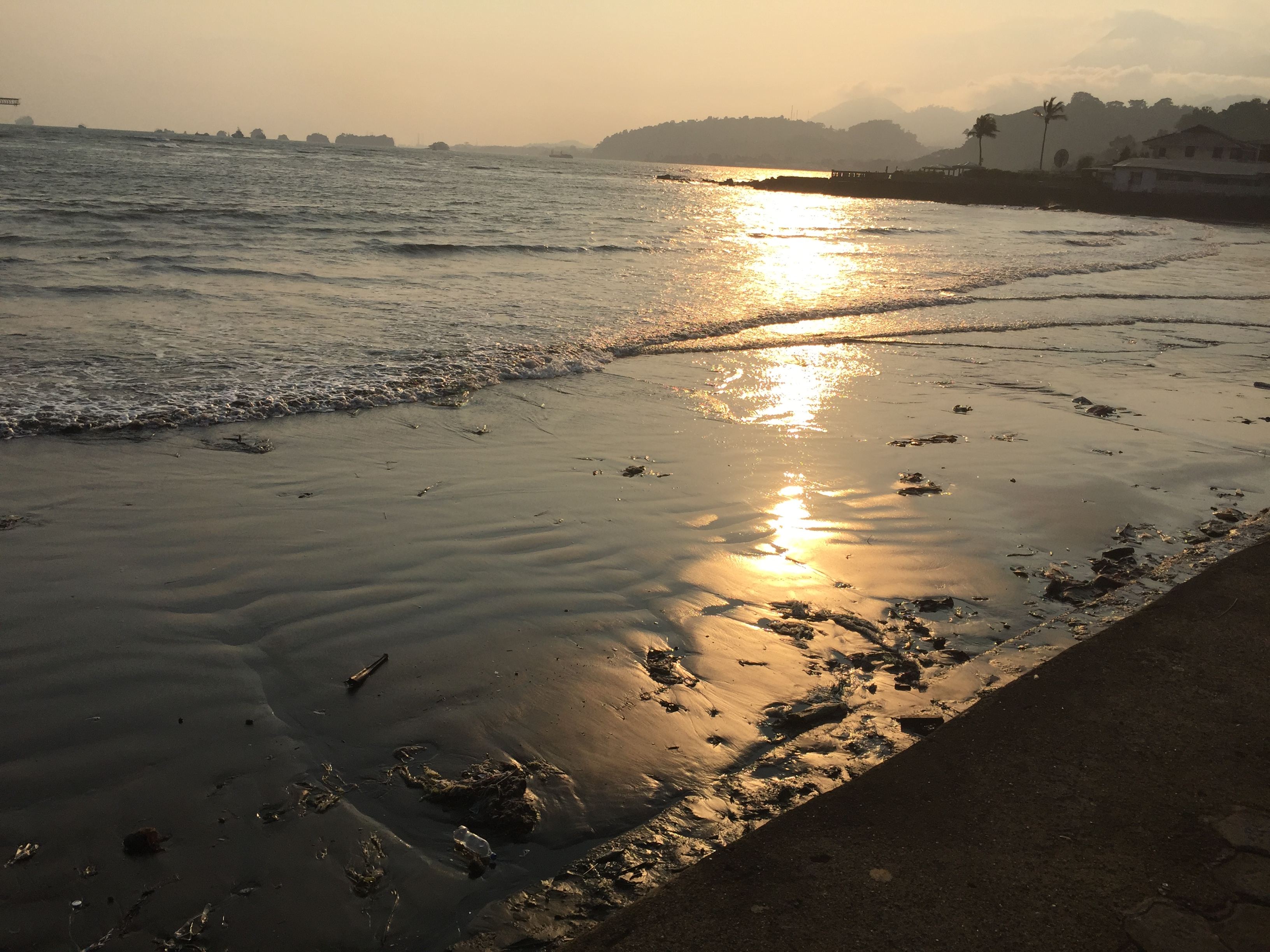 a view of Down beach Limbe at sunset in the South west region, Cameroon